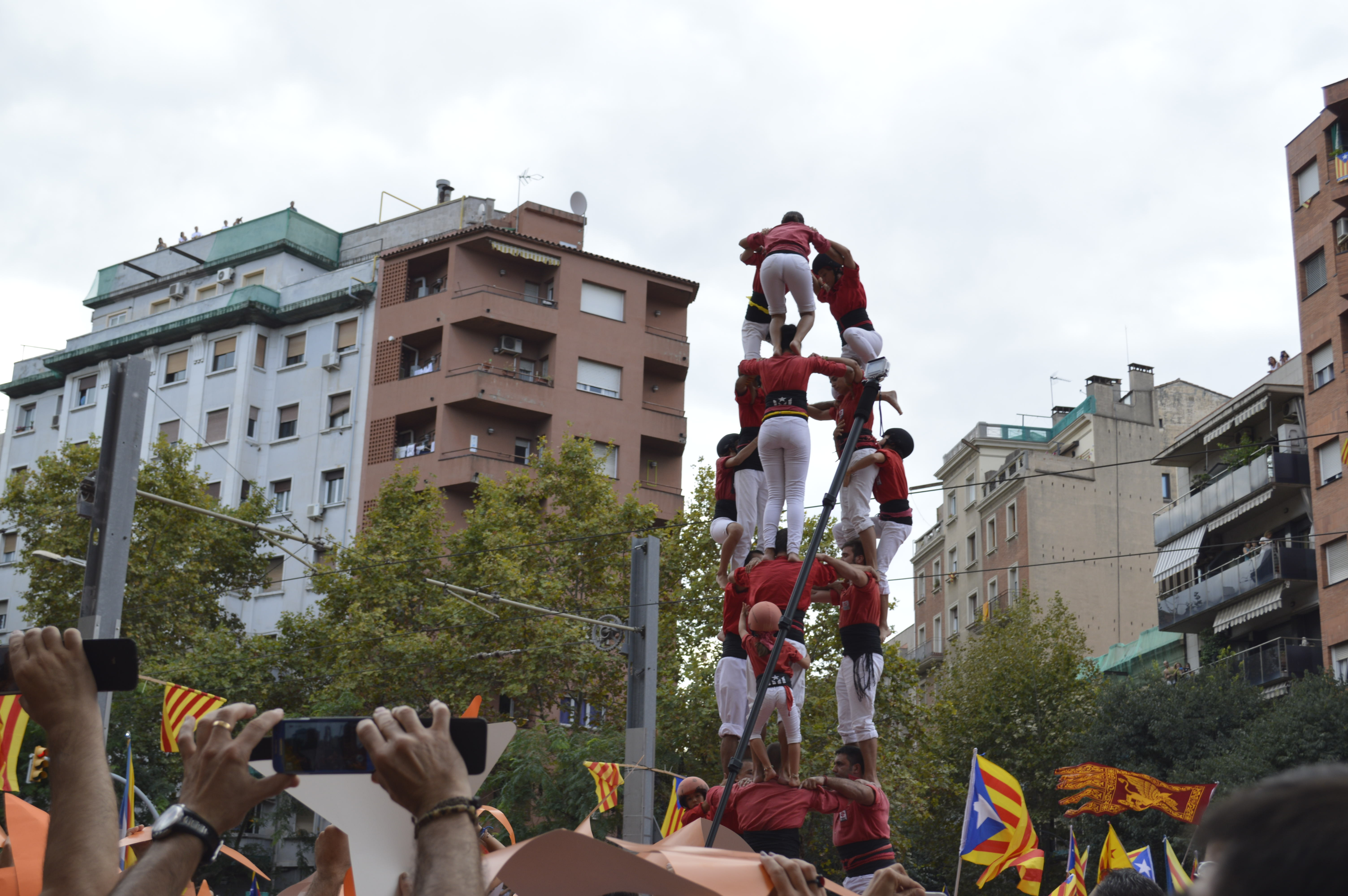 ViaLliure Meridiana - 21300802496- castells